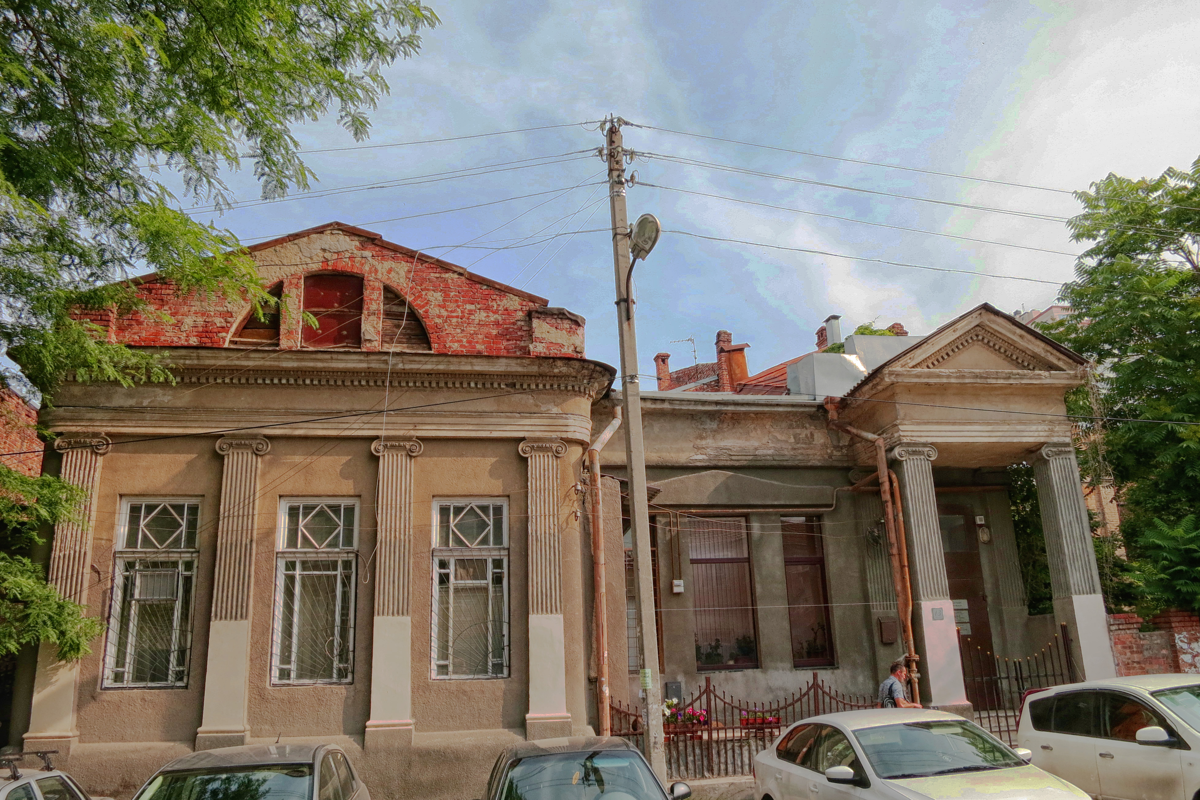 Особняк Г.В. Трунова: улица Темерницкая, 13, литеры А, А1, Ростов-на-Дону, Ростовская область